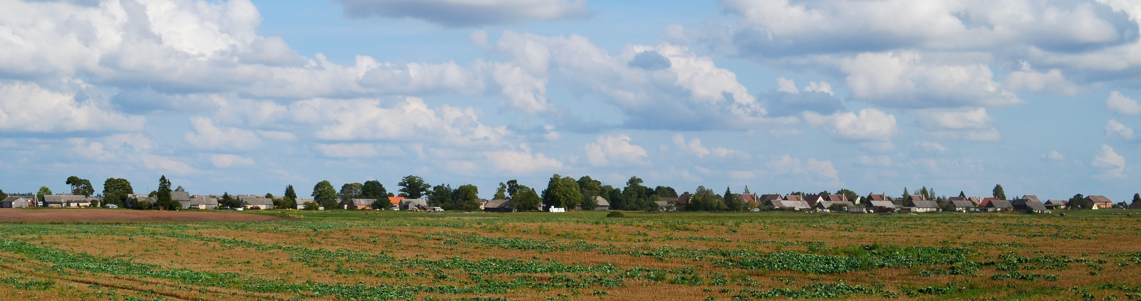 Kairėnėliai, Radviliškio raj.